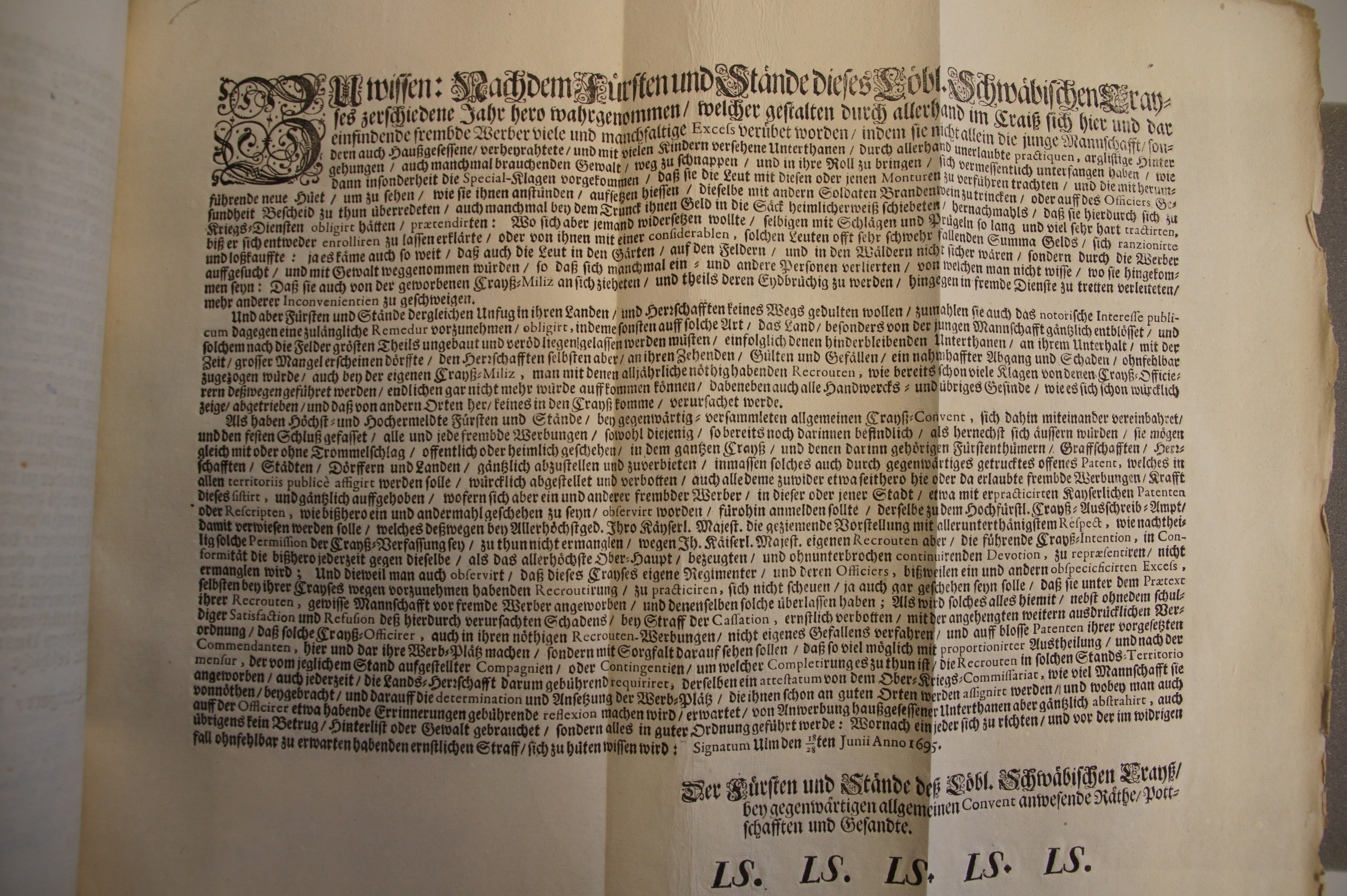 Beschluss des Schwäbischen Reichskreises, fremde Werbung zu verbieten